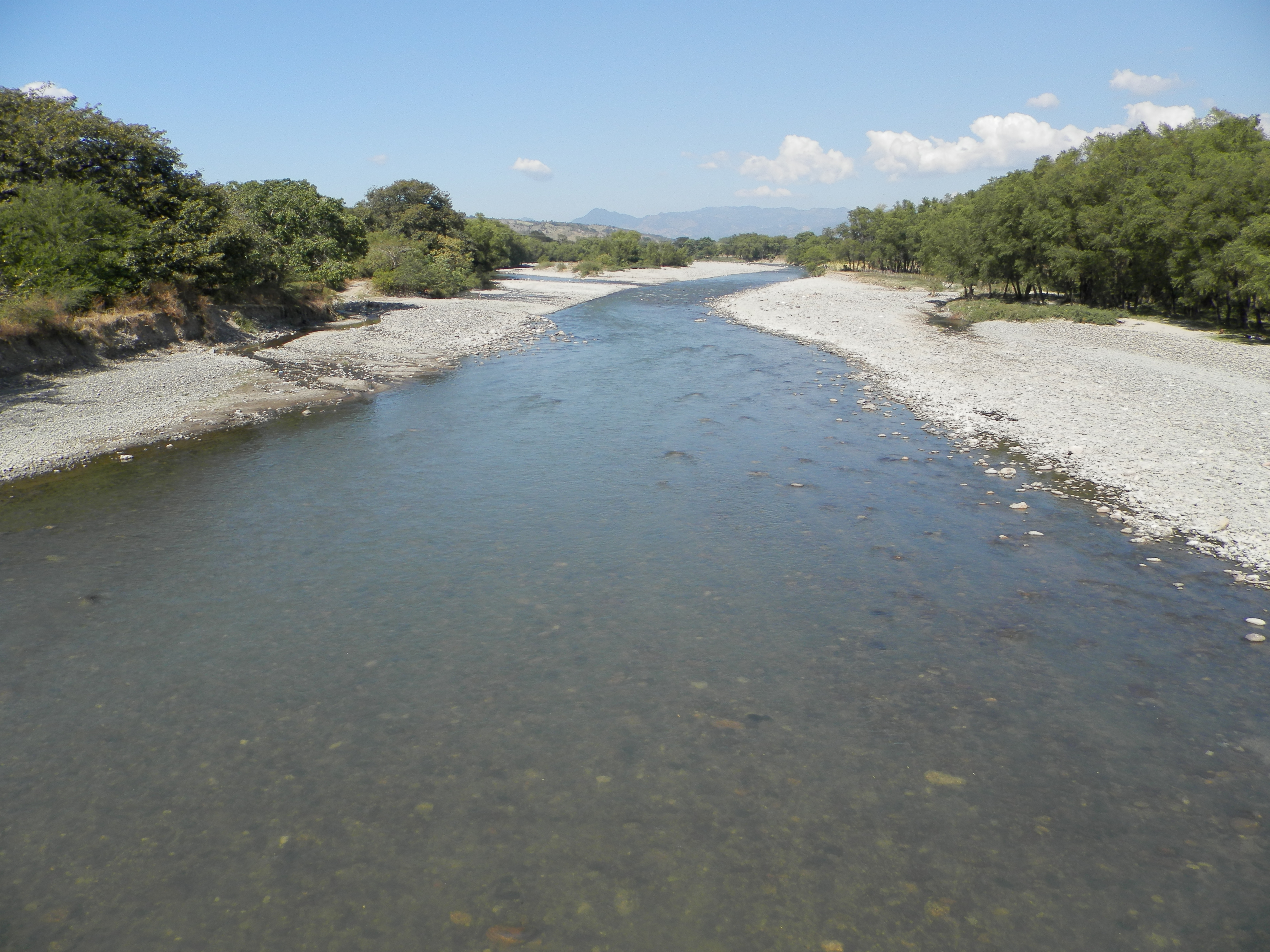 Rio Lempa a la altura de El Poy